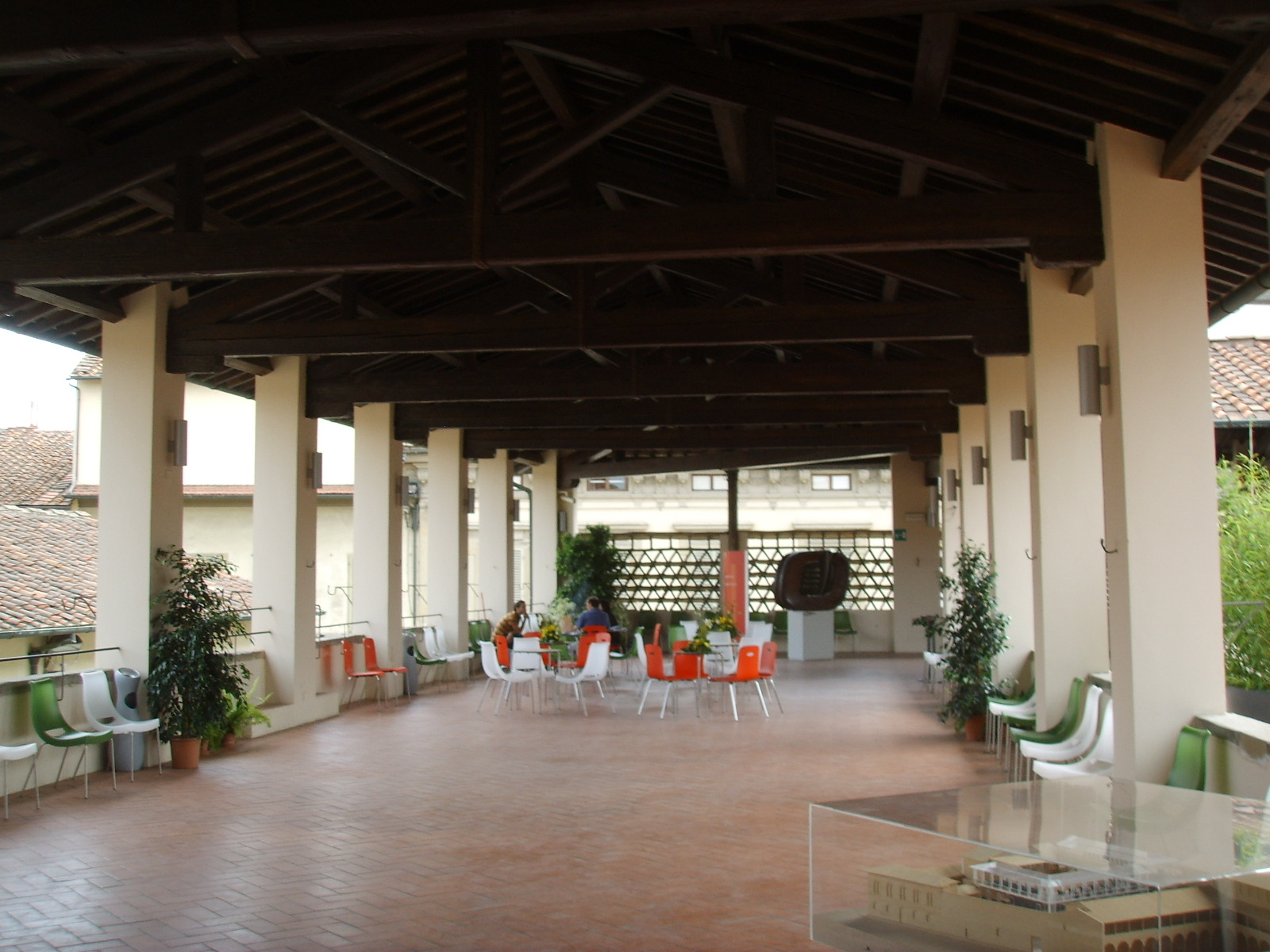 Biblioteca delle oblate 03 terrazza